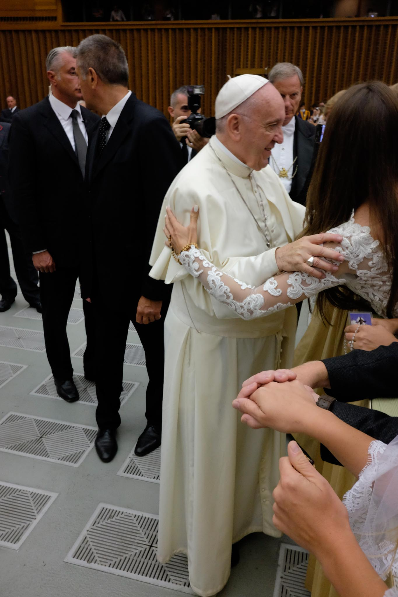 Papstaudienz 01.08.2018